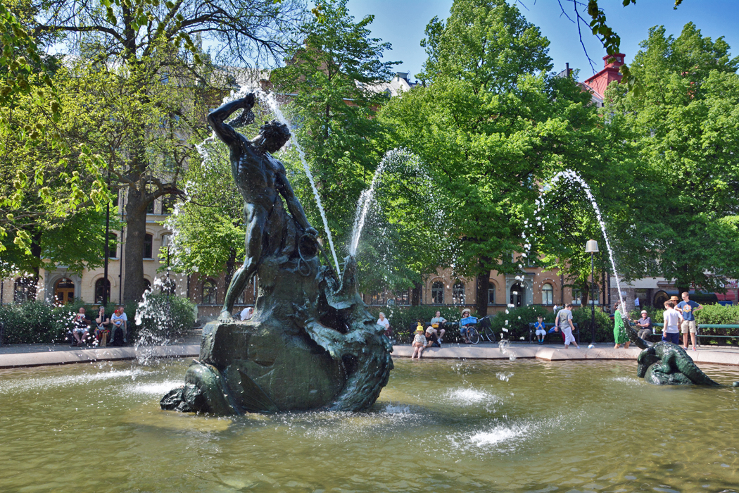 Thor als Brunnenfigur auf dem Mariatorget, Södermalm (Stockholm)